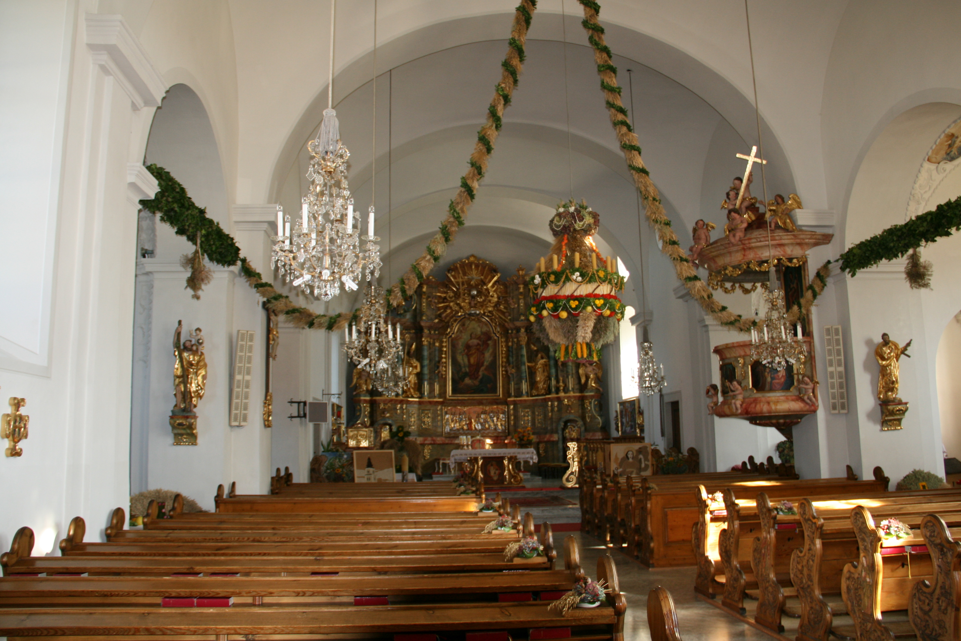 Kath. Pfarrkirche hl. Margaretha und Kirchhofmauer mit Nischenkapellen